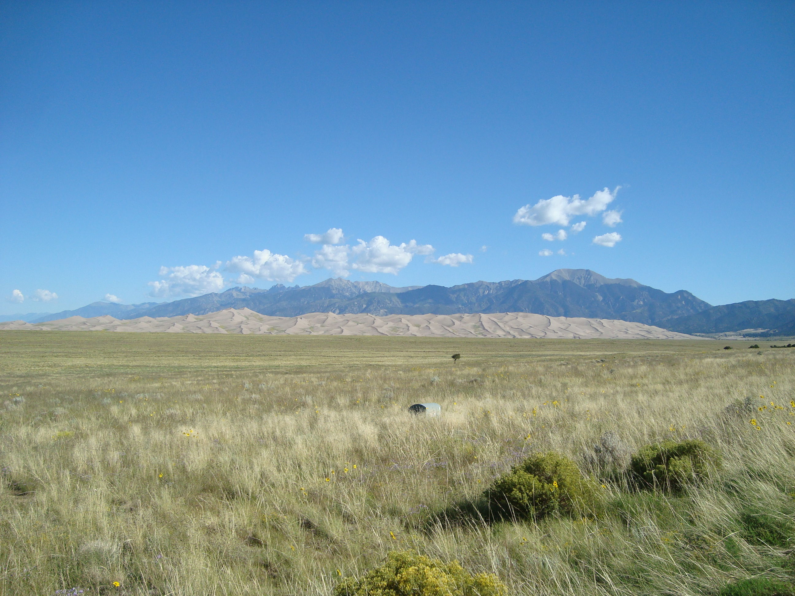 Great Sand Dunes National Park from State Highway 150